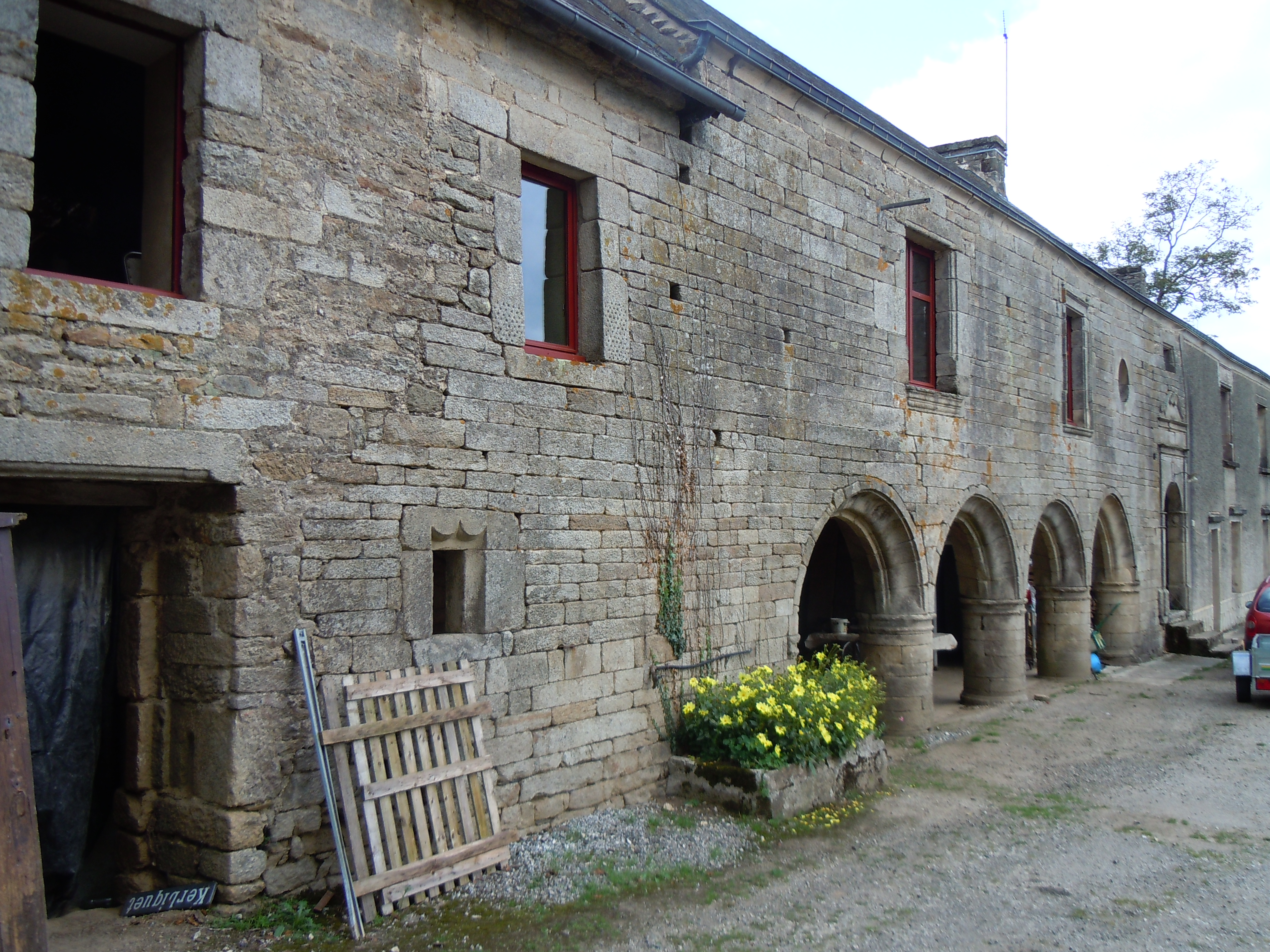 Manoir de Kerbiquet, vue de la galerie à arcades, commune de Gourin, département du Morbihan, France